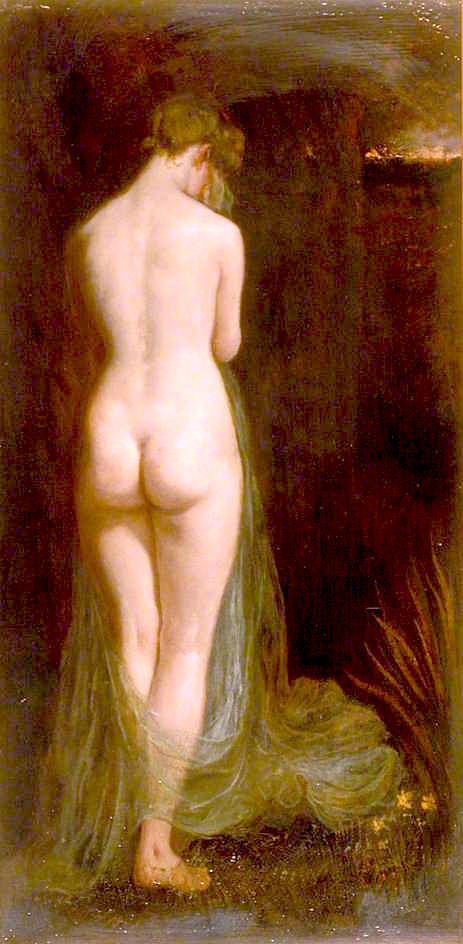 John Anster Christian Fitzgerald (1819?—1906). Study of a Nude Woman.Guildhall Art Gallery - London.